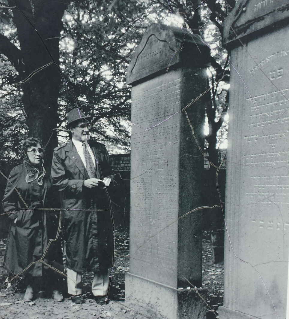 Detail der Infotafel am Carlebach Park im Hochschulstadtteil. Das Photo zeigt Miriam Gillis-Carlebach und ihren Mann Mosche Gillis am Grab ihrer Großeltern Esther und Salomon Carl auf dem Jüdischen Friedhof in Moisling